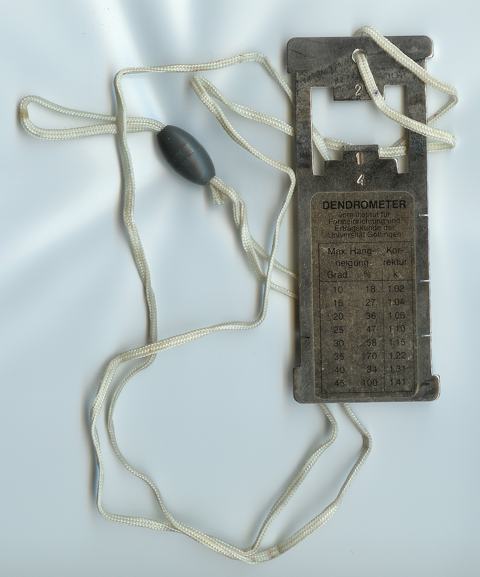 Dendrometer nach Kramer; von Prof. Dr. Horst Kramer (1924-2015) am Institut für Forsteinrichtung und Ertragskunde der Universität Göttingen entwickeltes Messinstrument